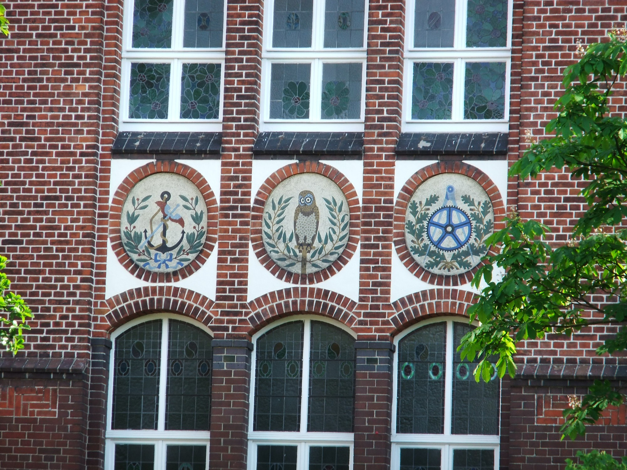 Reform-Real-Gymnasium Geestemünde, Raabe-Schule in Bremerhaven, Friedrich-Ebert-Straße 10.